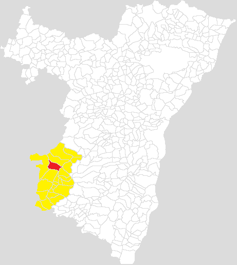 Communauté de communes de la Vallée de la Bruche